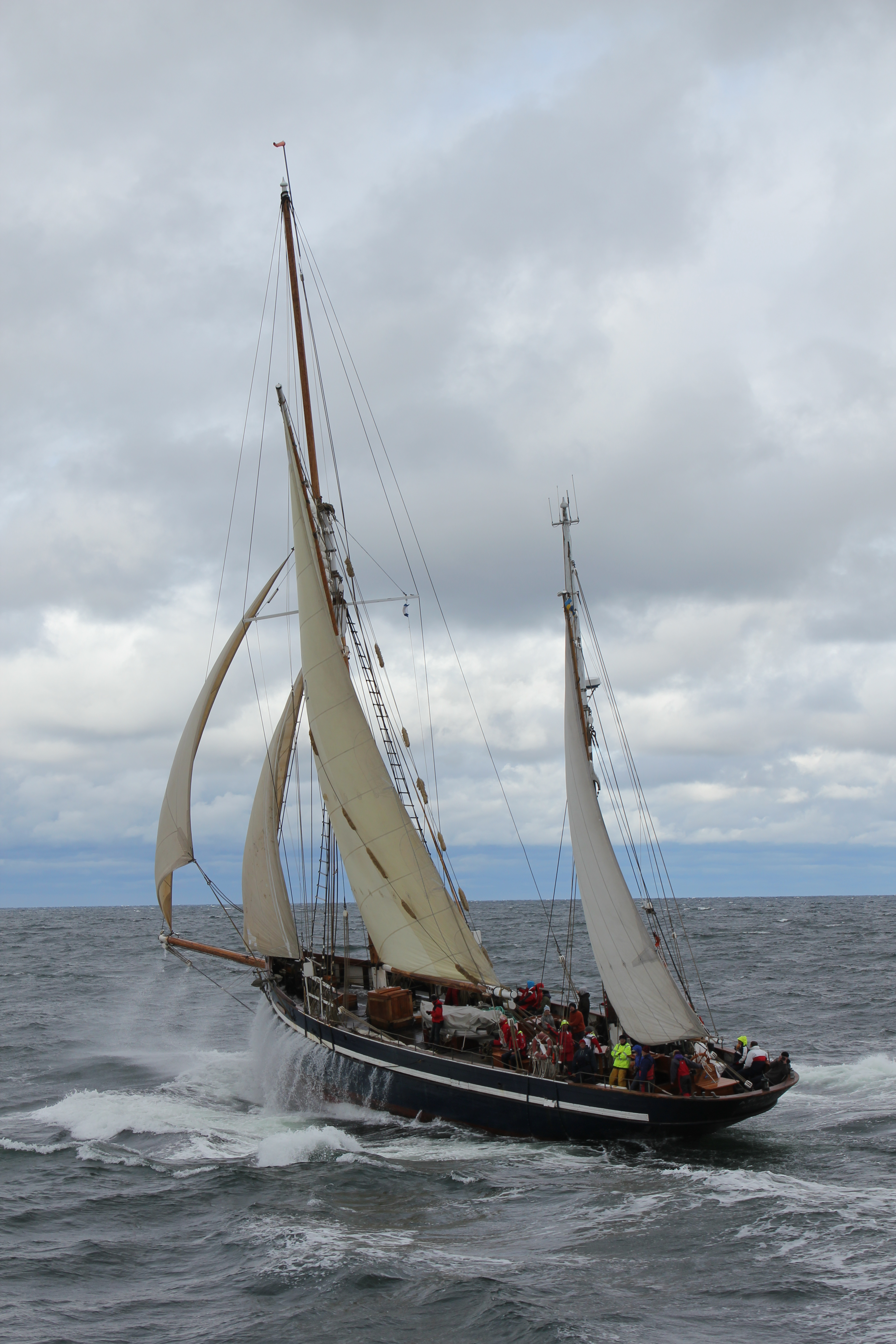 Svenska Kryssarklubbens Seglarskolas fartyg, kuttern Atlantica, seglar utanför Vinga